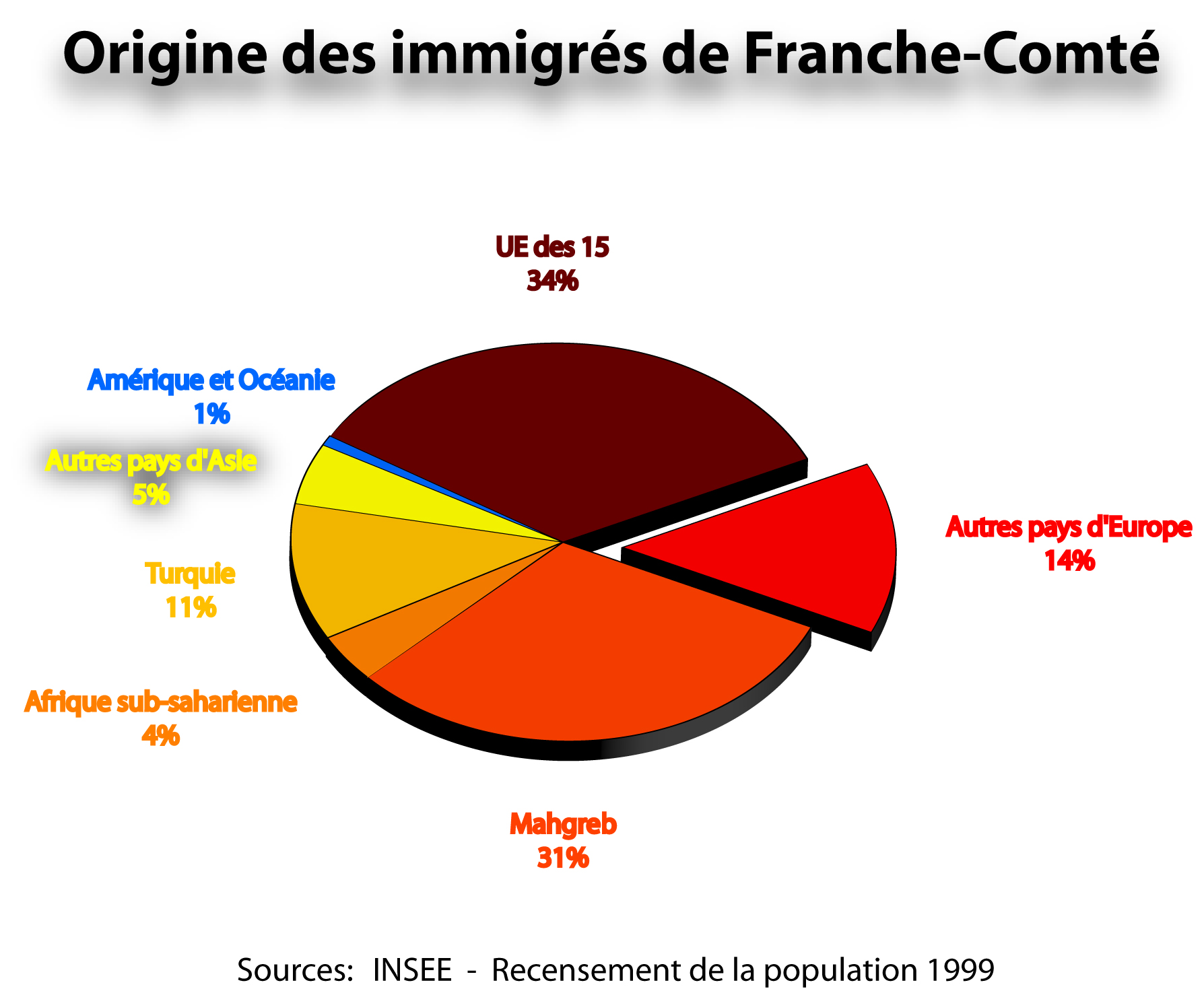 Graphique circulaire représentant la répartition de l'origine des immigrés en Franche-Comté Pie-chart showing the repartition of the origin of the immigrants in Franche-Comté (France)